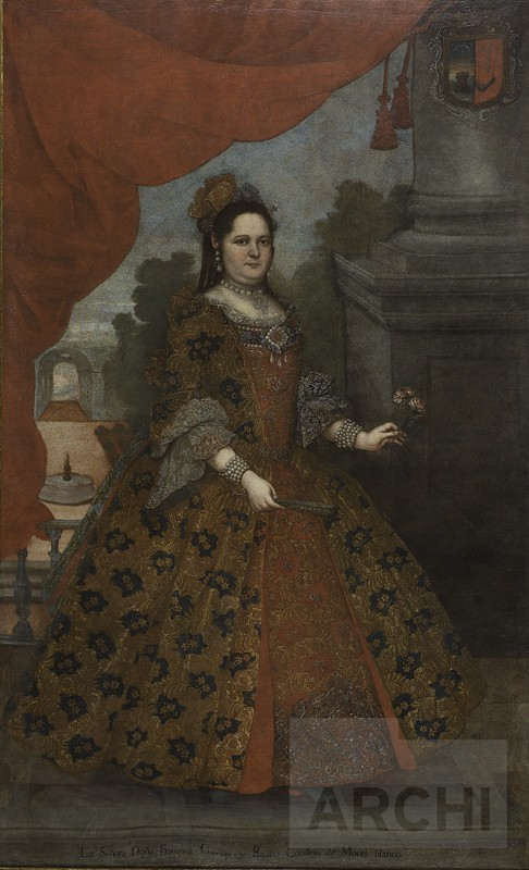 Retrato de María Francisca Gabino y Reaño, I condesa de Monteblanco